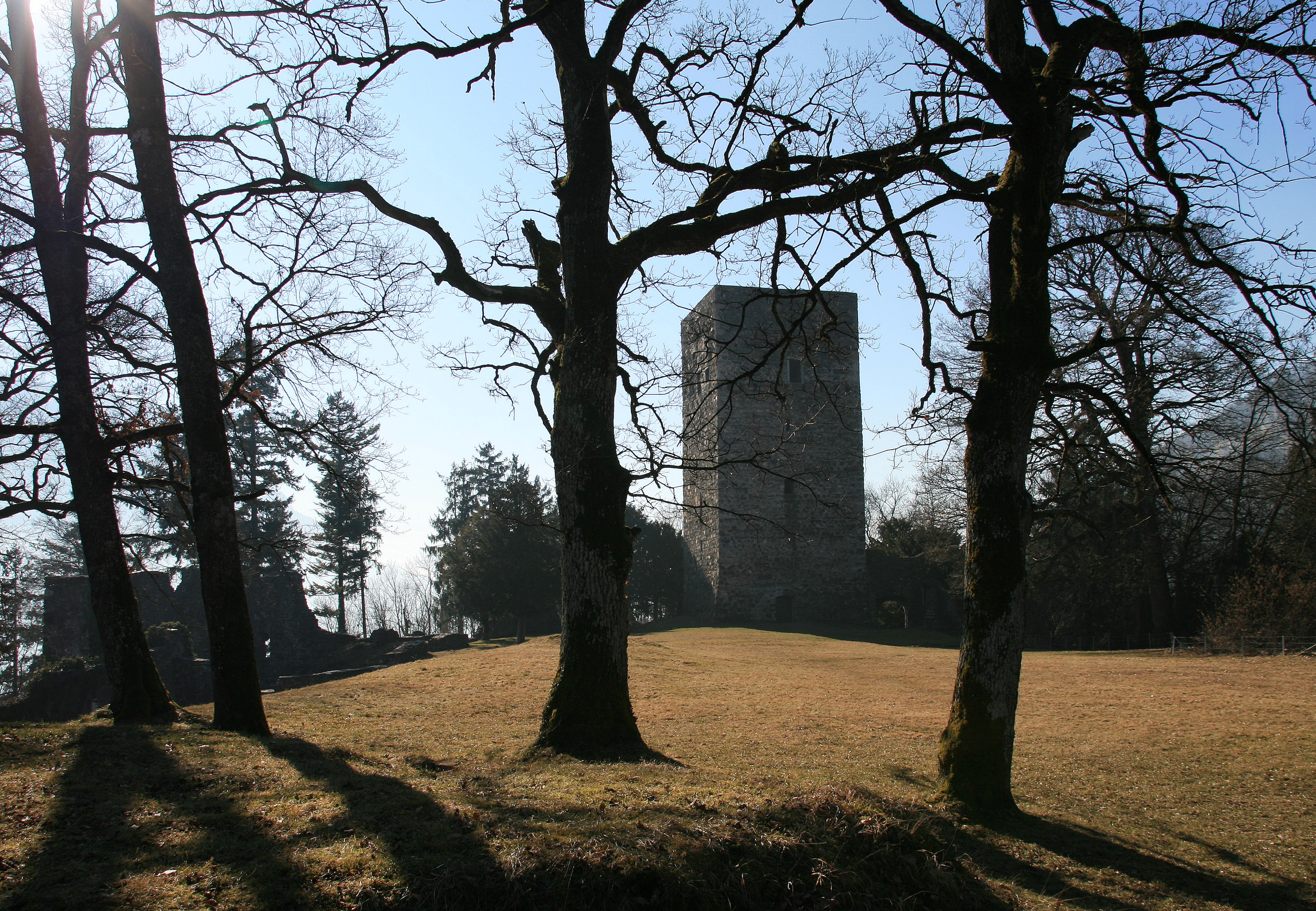 die "Tostner Burg" mit Burgpark, in Tosters bei Feldkirch in Vorarlberg.